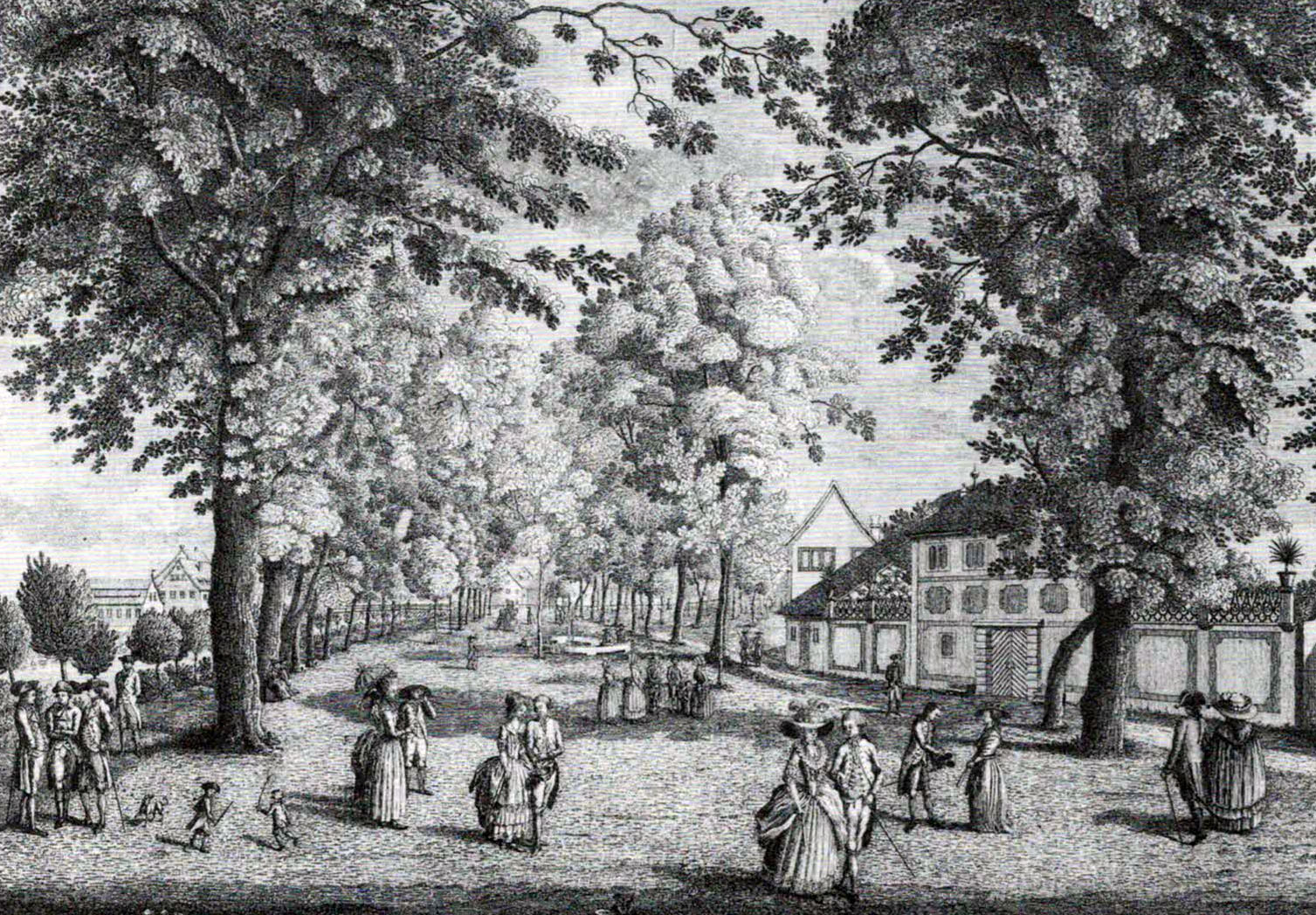 Prospekt der Hallerwiese von 1788